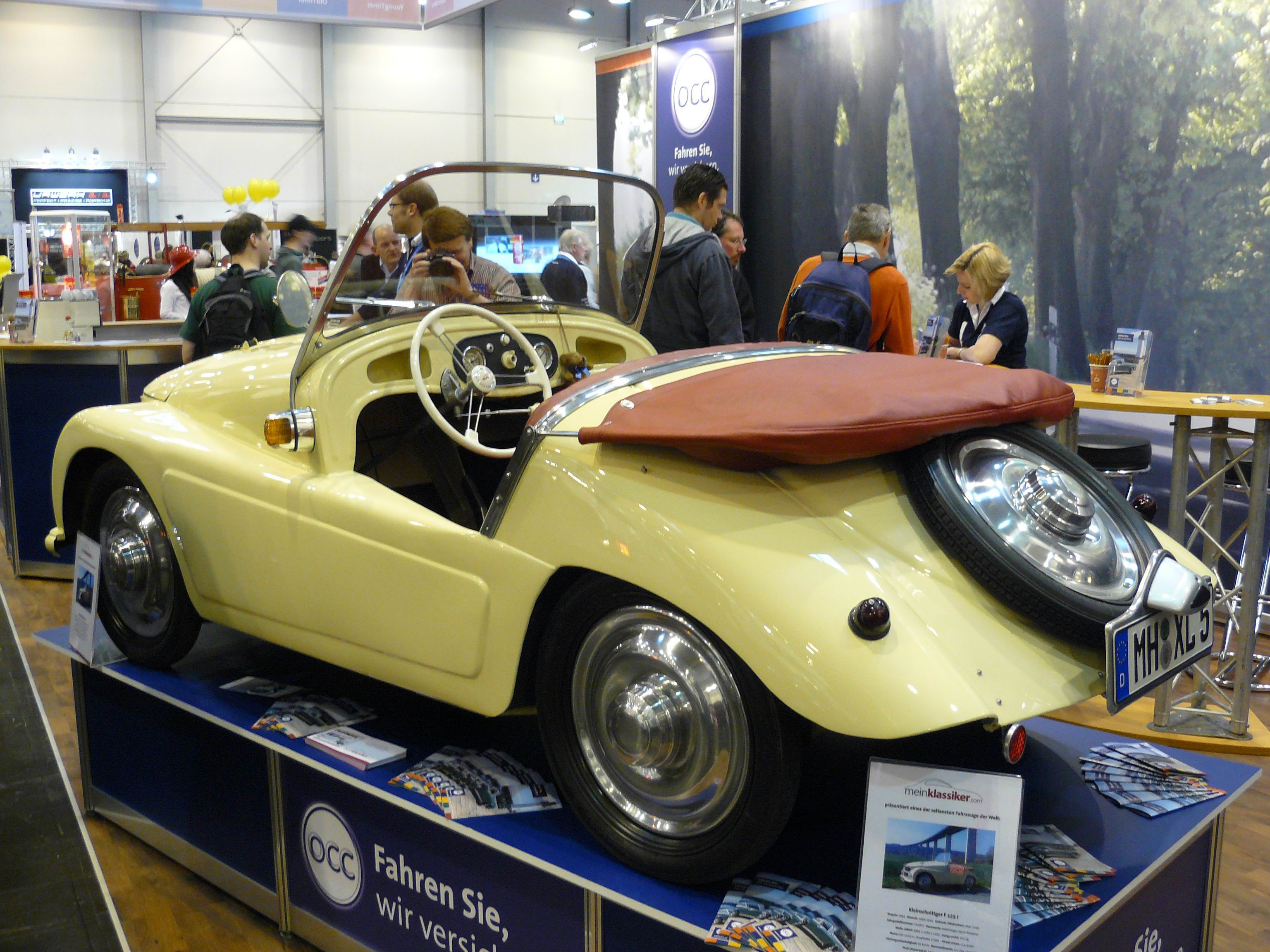 Essen 2011